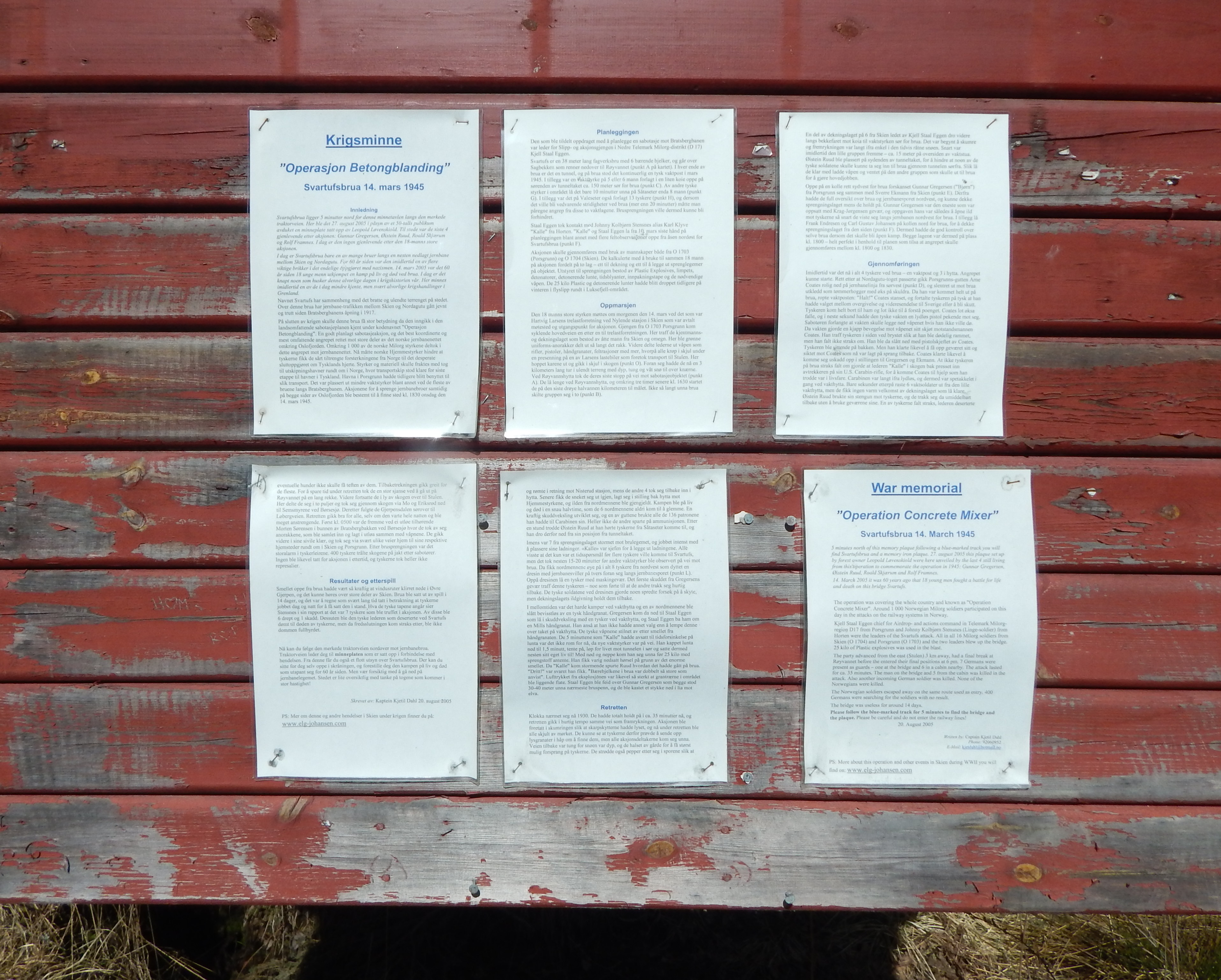 Oppslag ved Svartufs (Valebø) om lokal aksjon i forbindelse med Operasjon betongblanding. Oppslaget er skiltet som krigsminnesmerke fra Valebøvegen (fylkesvei 44).